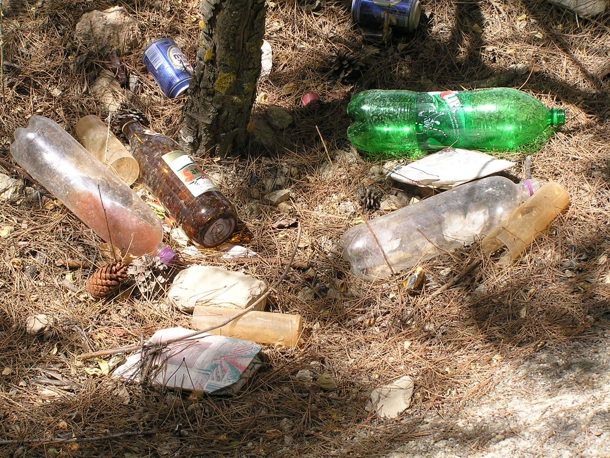 Vejsvineri med en karakteristisk sammensætning.